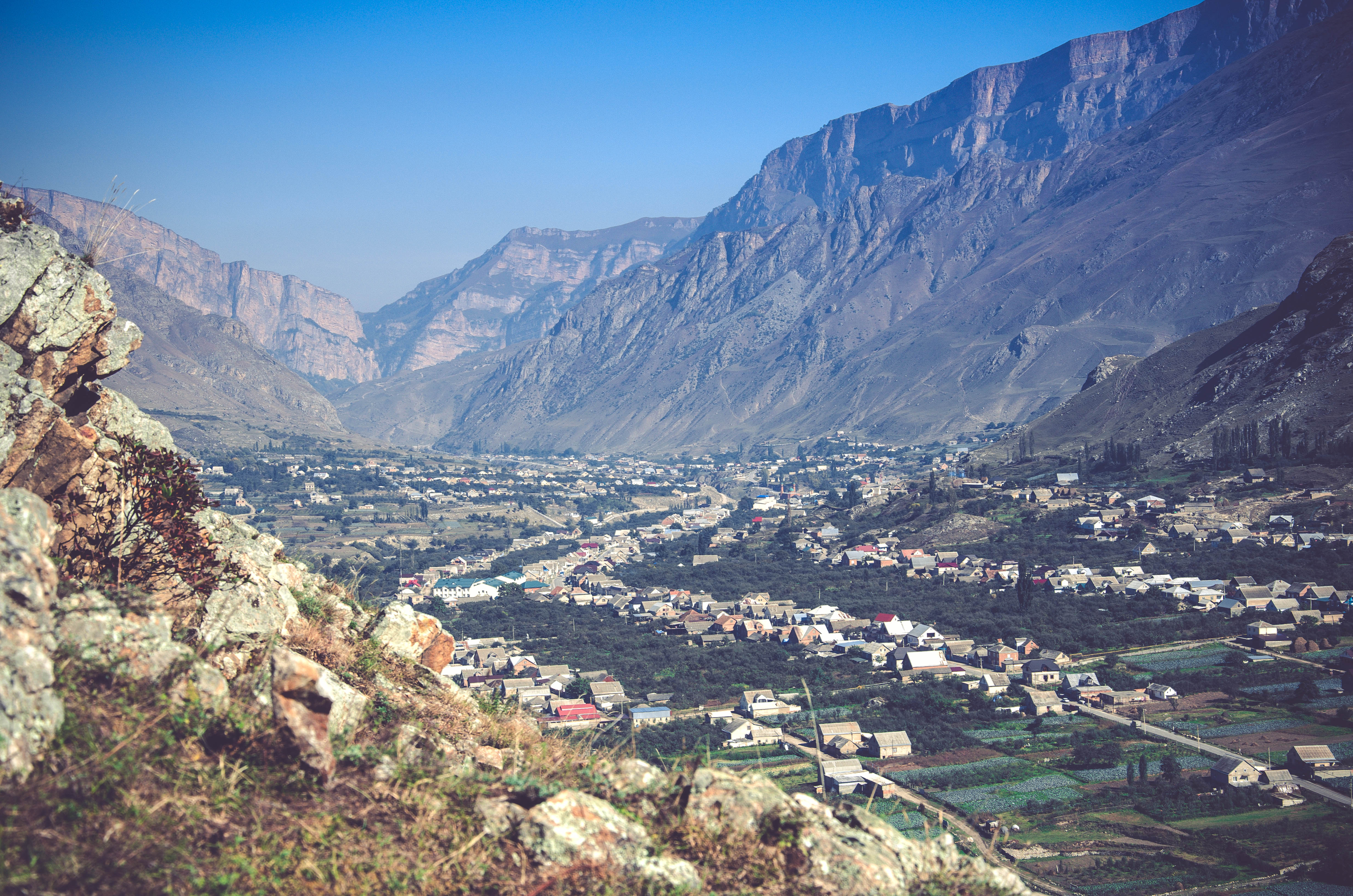 Черек-Балкарская теснина: В ущелье одноименной реки ниже с. Верхняя Балкария,Верхняя Балкария,Черекский район, Кабардино-Балкария This image is related to the protected area of Russia number 0710036